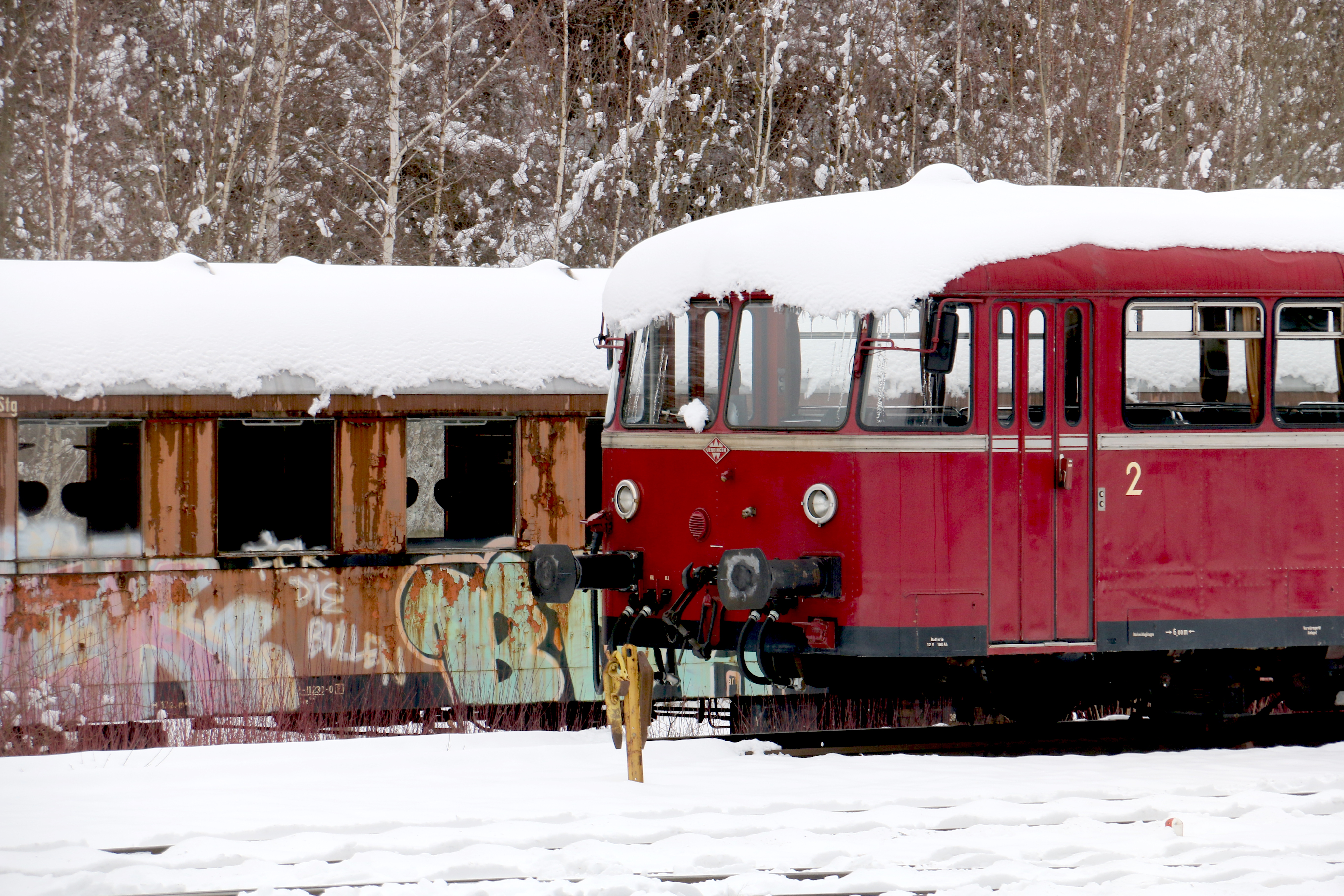 Alter Personenzug in Rottweil (2018)